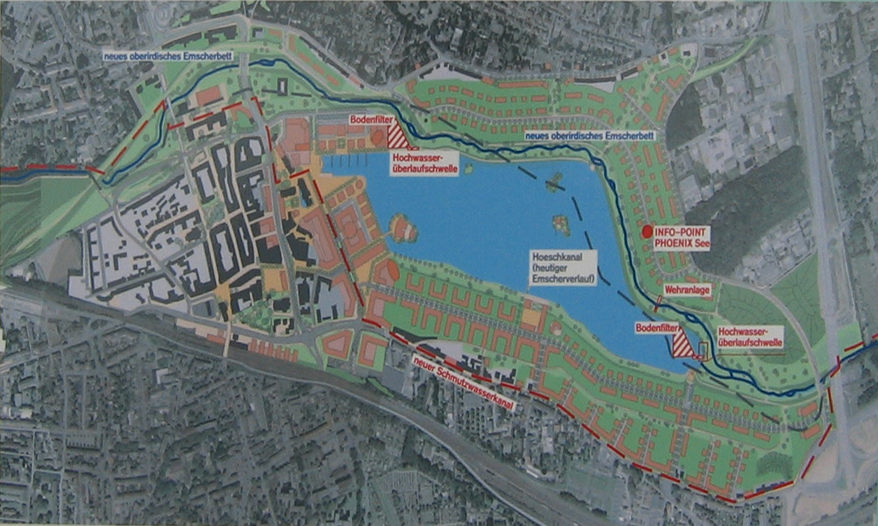 Karte des geplanten Phoenixsees Dortmund